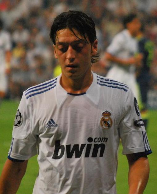 Primer partido de la Champions Legue Real Madrid 2 - Ajax 0 15 septiembre 2010